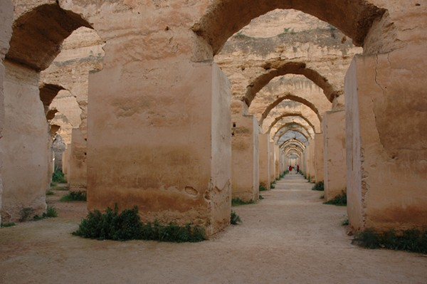 Meknès - Graners de Mulay Ismail